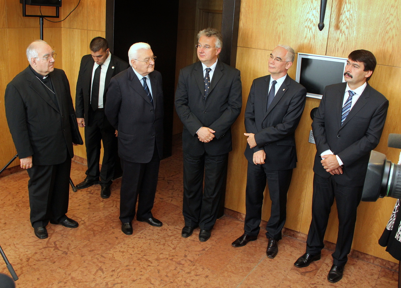 A Mindszenty emlékkiállítás és konferencia megnyitóján, a Terror Házában: Alberto Bottari de Castello, ... Boross Péter, Semjén Zsolt, Balog Zoltán, Áder János.